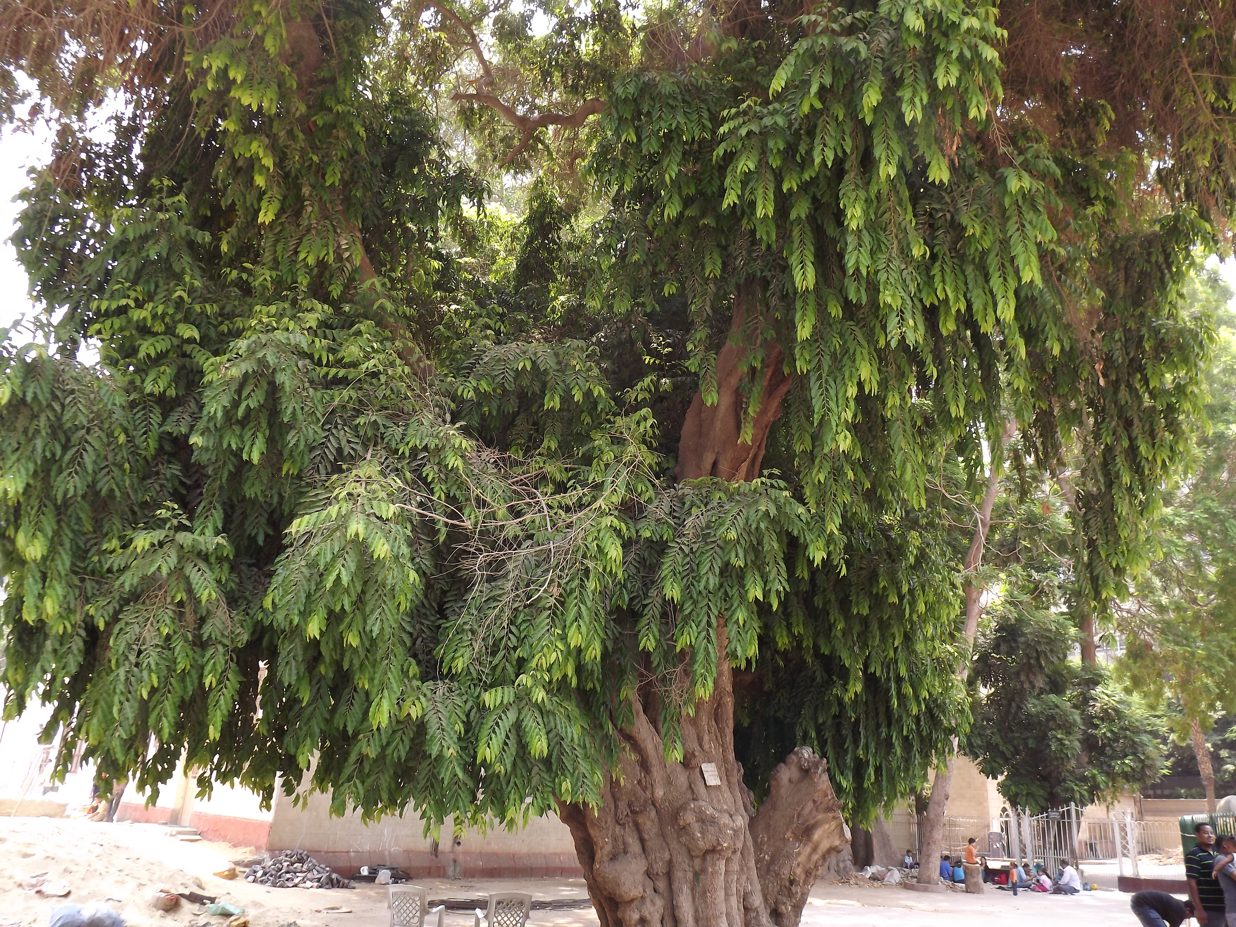 بوترنجيفا روكسبارجي